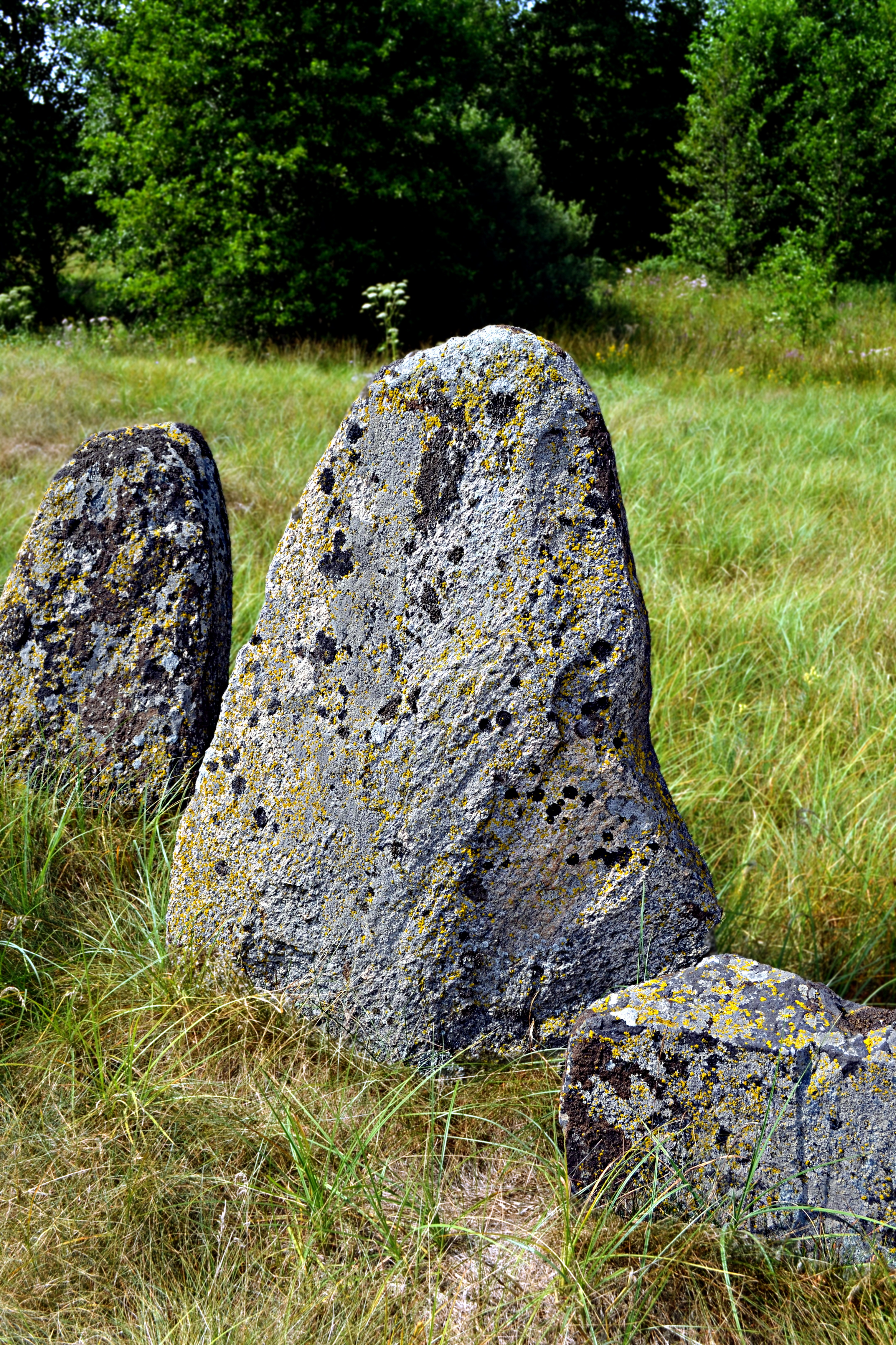 Беларуская (тарашкевіца): Шпакі (Пружанскі раён). Яцьвяскія могілкі